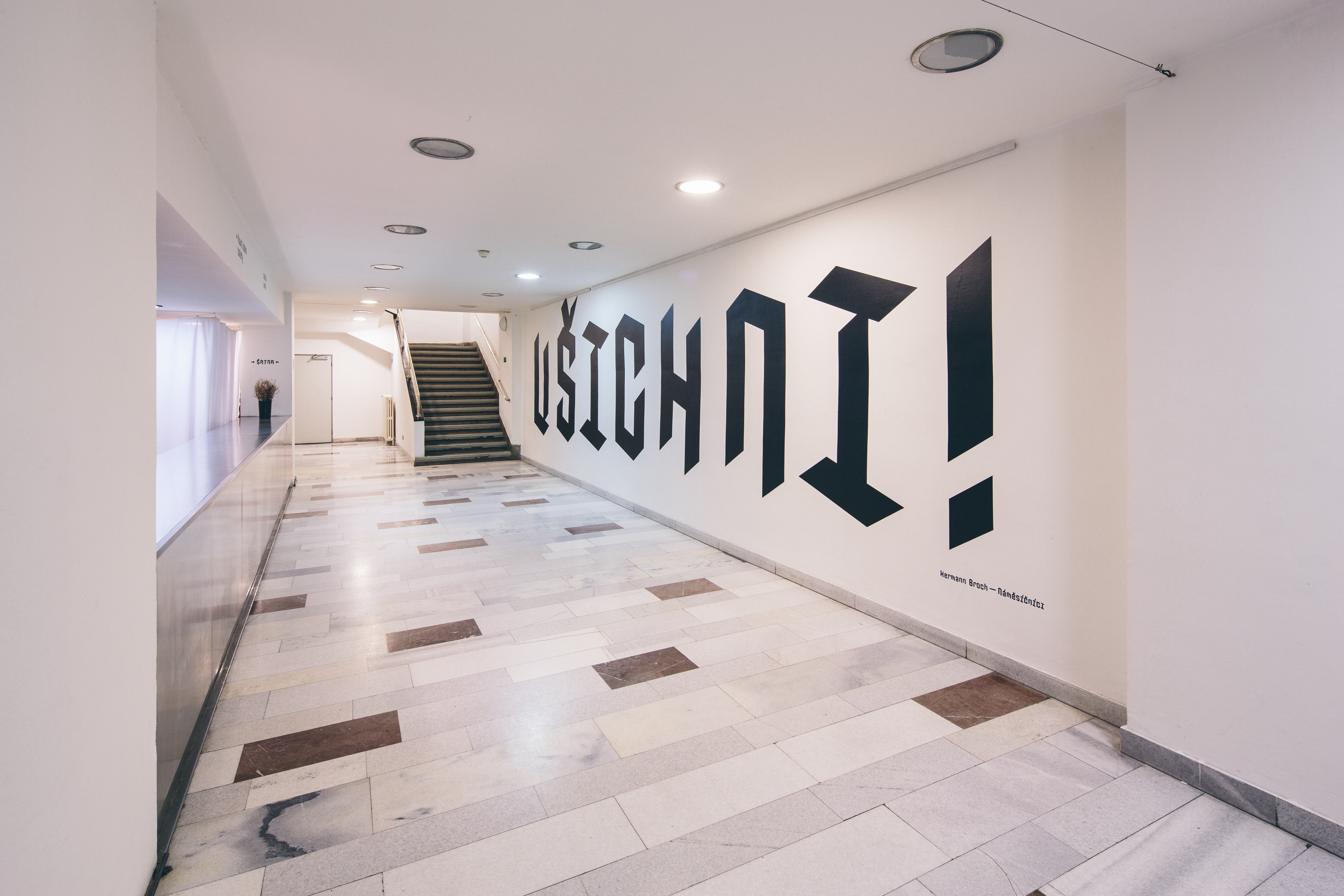 HaDivadlo - prostor před šatnou